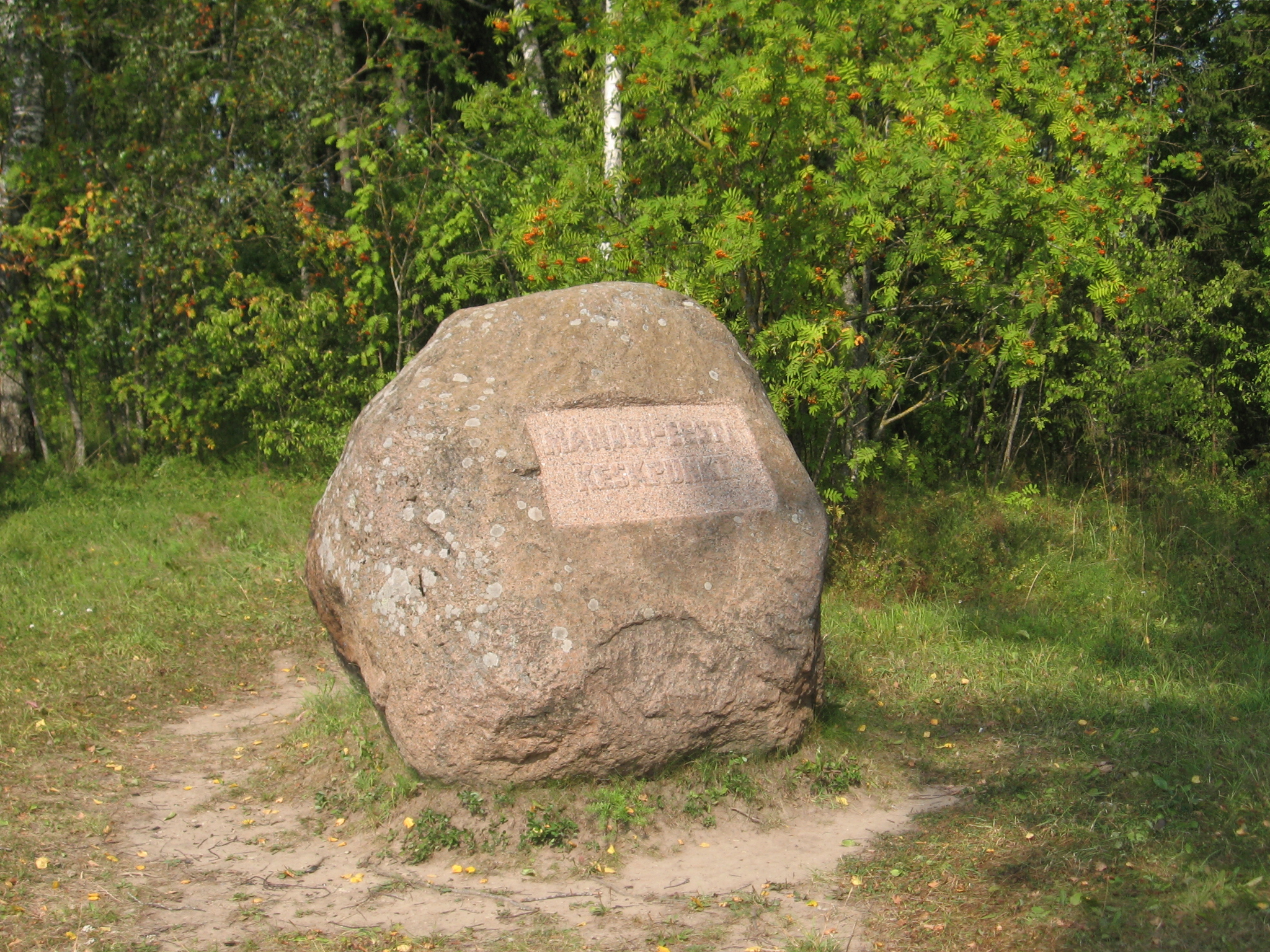 Mandri-Eesti keskpunkti märkiv tähis, Kalmemägi